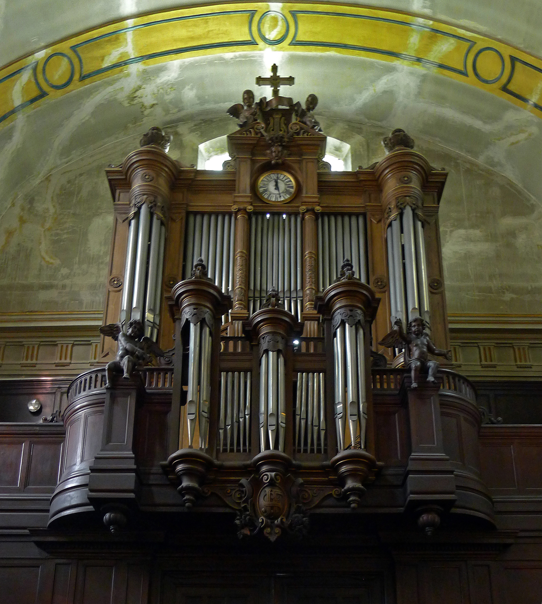 Cathédrale arménienne catholique sainte-Croix-de-Paris (orgue) - Paris III